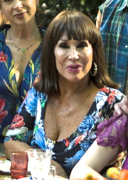 Moria Casán en mayo del 2015.